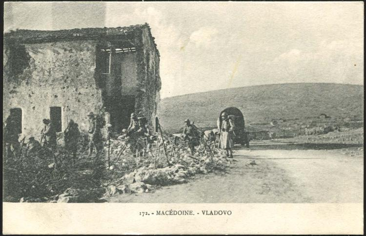 Съглашенски части във Владово през Първата световна война.